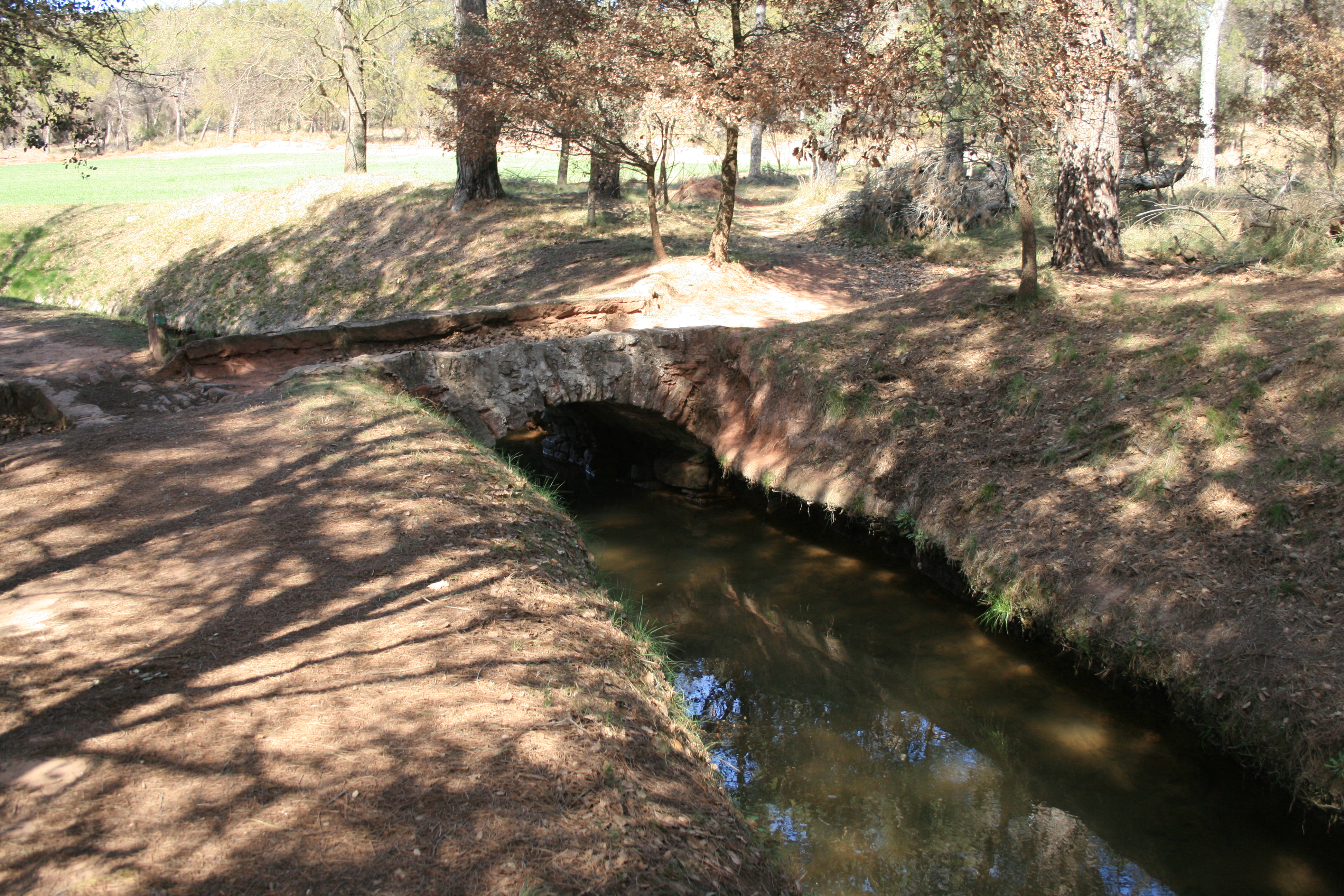 Tram de la Sèquia de Manresa al seu pas per Sallent.